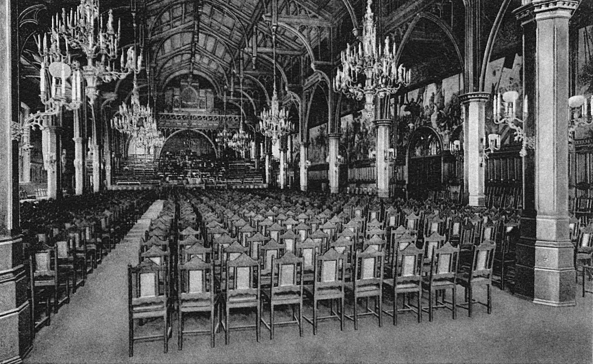 Köln a. Rh., Großer Gürzenich-Saal